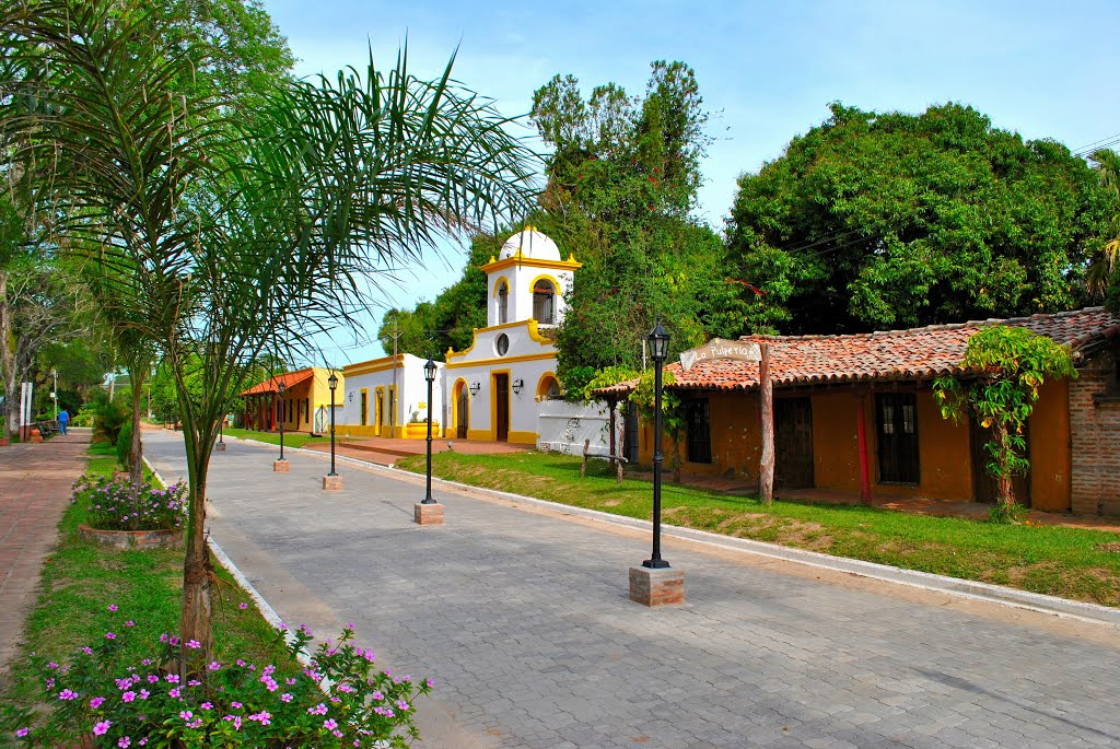 Una de las locaciones en donde se filmó "La Riña"